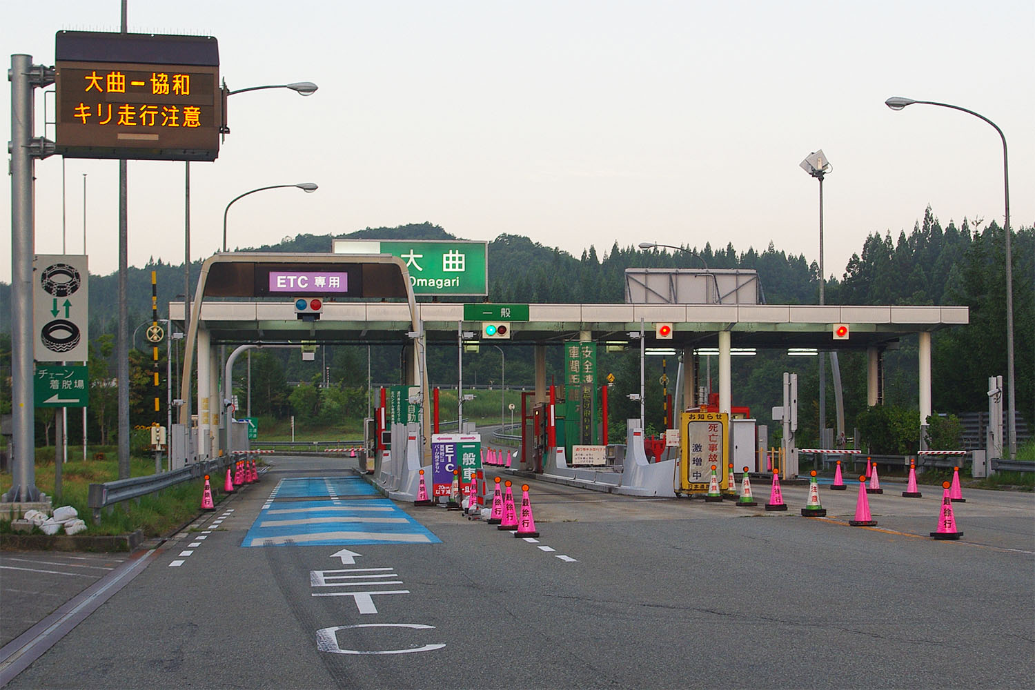 秋田自動車道 大曲インターチェンジ